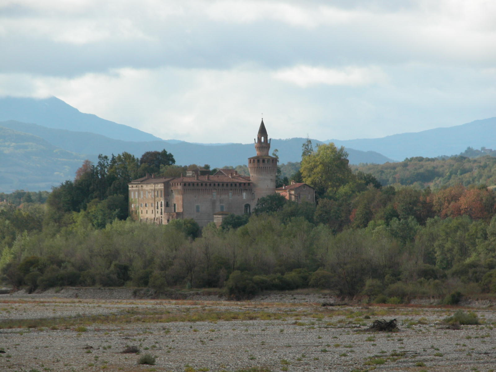 Gazzola, castello di Rivalta (foto del 2002)